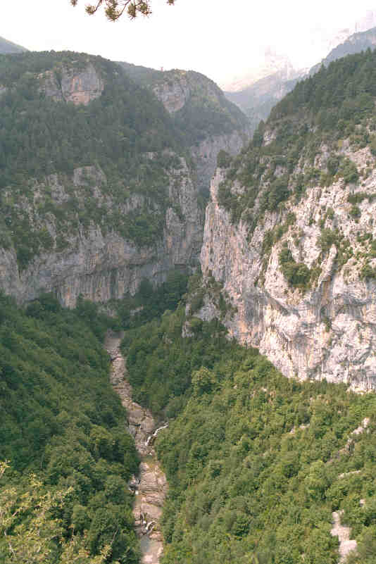 Gargantas de Escuaín, en su tramo final, tomada desde el Mirador de Revilla. Se distingue abajo en el cauce el nacimiento de la 'Fuente de Escuaín. Tomada el 23 de julio de 2003 por José María Sánchez y cedida para Wikipedia.